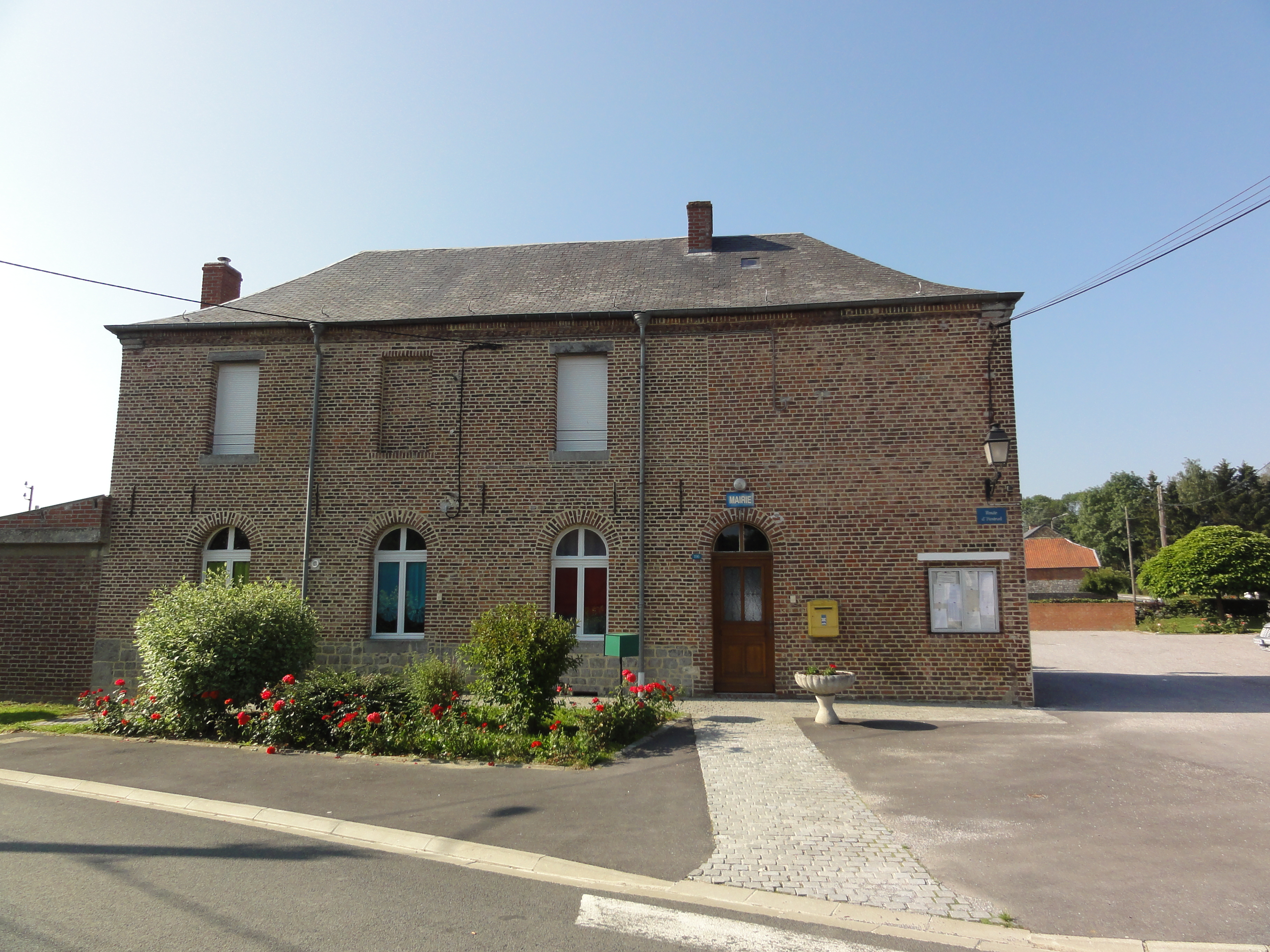 Eccles (Nord, Fr) mairie